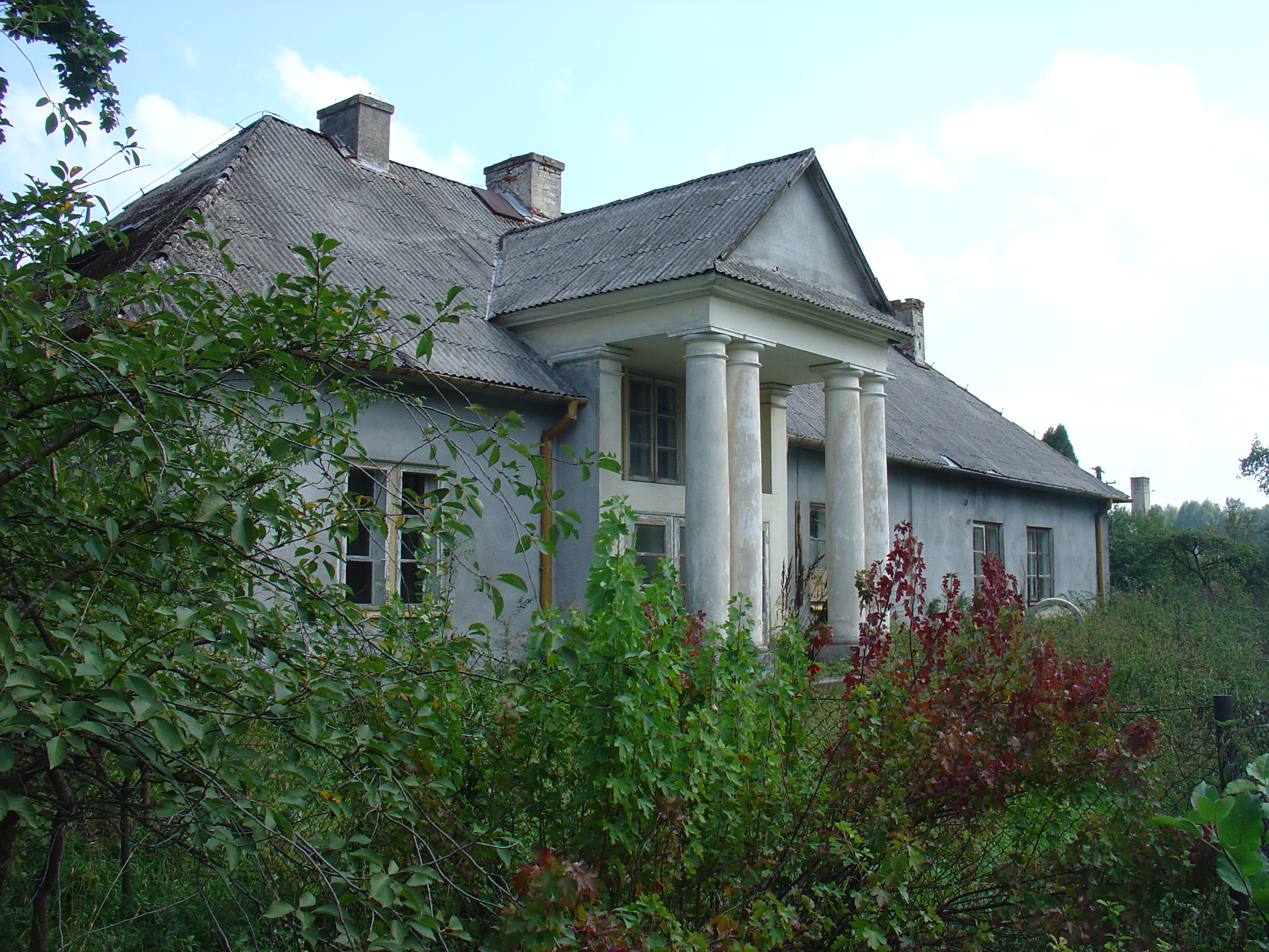 Panasówka - zespół dworski (1 poł. XIX): dwór, park (zabytek nr A/635 z 25.09.1972)